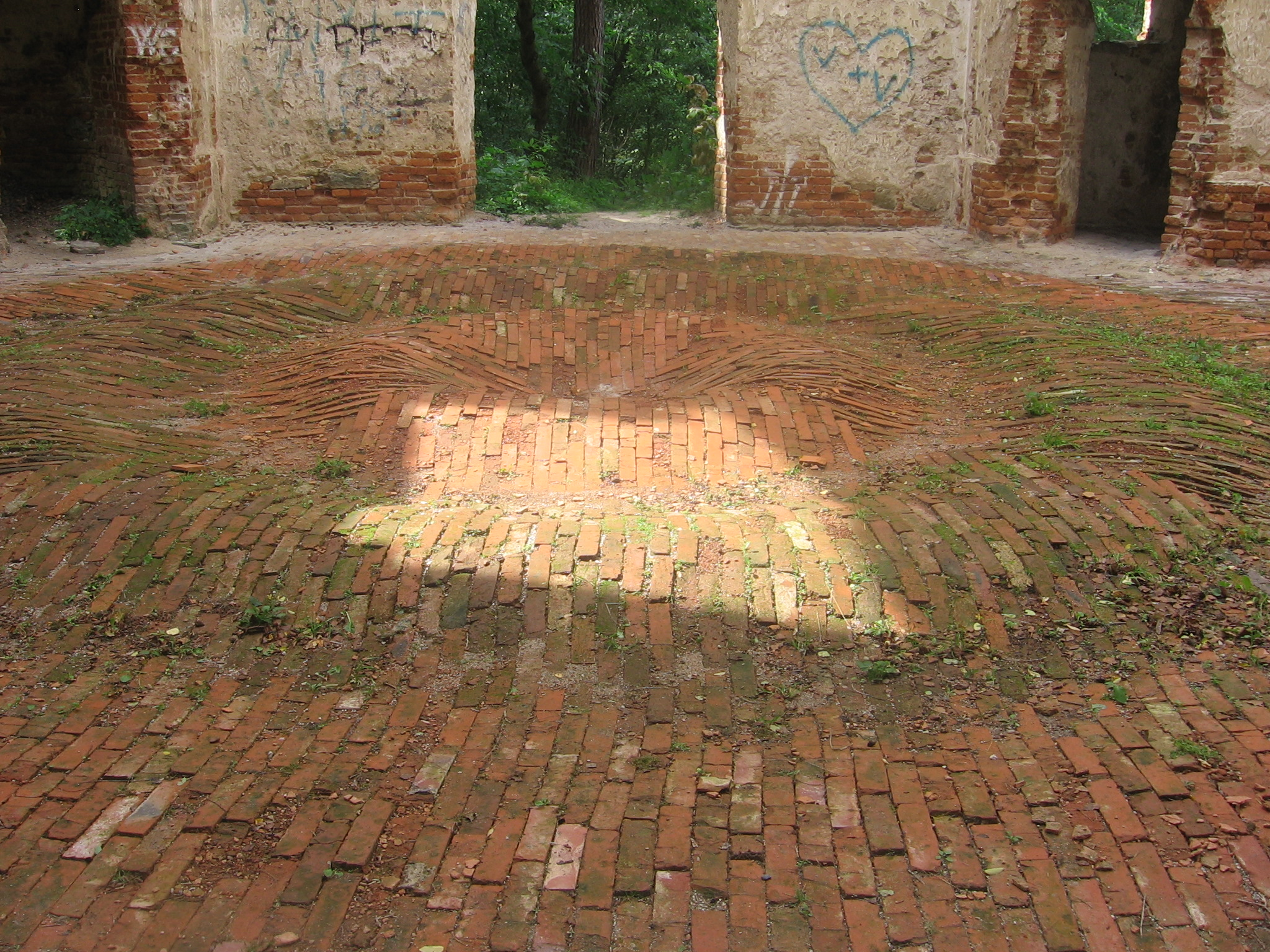 Dílo "Kapka - Hladina hloubky" vzniklo v roce 2013 v rámci projektu "Zaniklé a ohrožené kostely". Autorka Kristýna Kužvartová. Ateliér Socha a prostor prof.akad.soch.Jiřího Beránka, Fakulta designu a umění L.Sutnara, ZČU v Plzni ve spolupráci s EHMK Plzeň 2015 a Plzeňským krajem. Kaple svatého Jana Nepomuckého, 1,5 km severně od Týnce, Týnec (okres Klatovy).